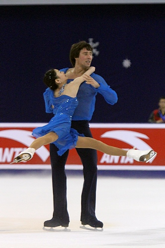 Юко Кавагути и Александр Смирнов на Кубке Китая 2011